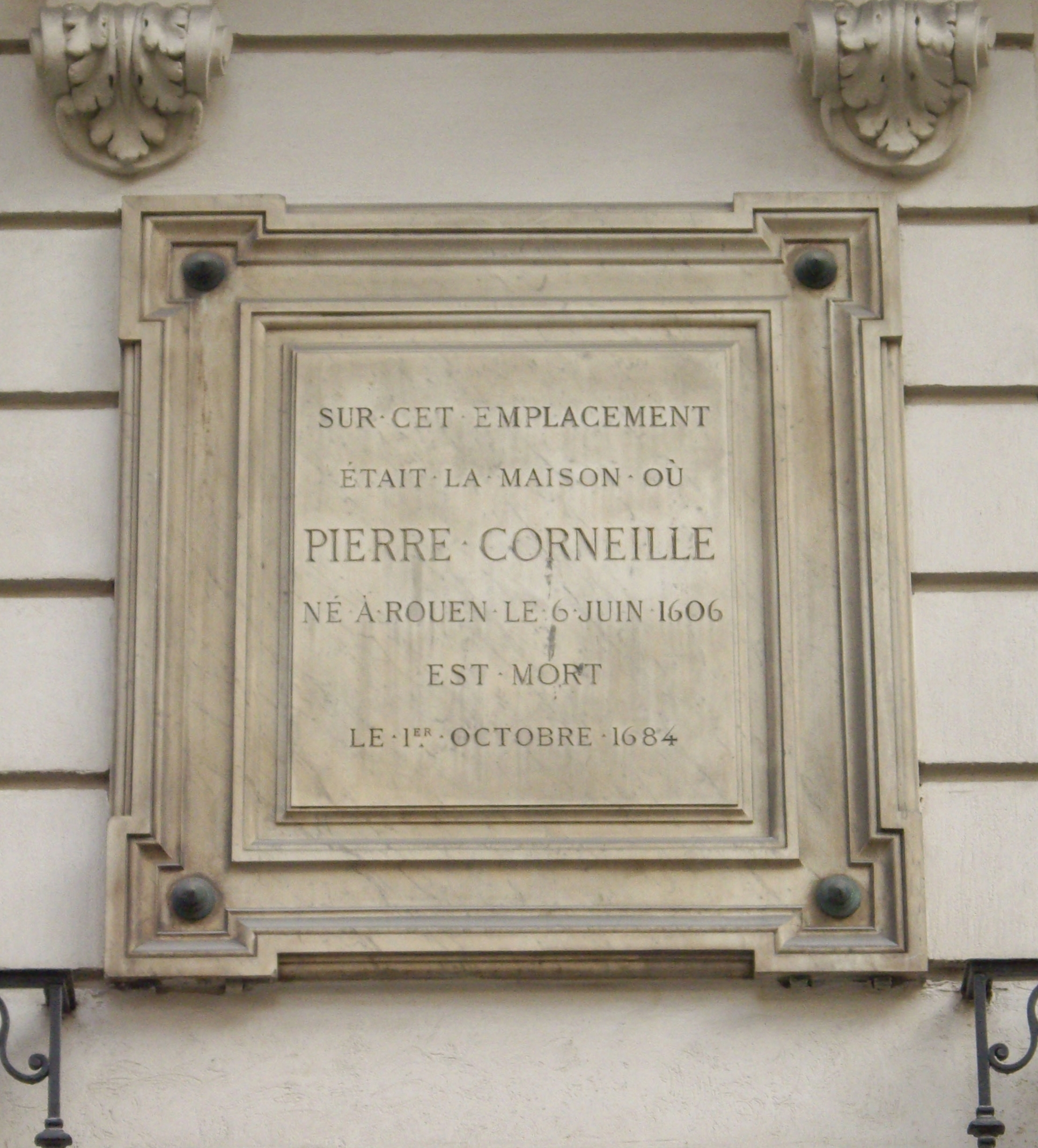 Plaque commémorative, 6 rue d'Argenteuil, Paris 1er. « Sur cet emplacement était la maison où Pierre Corneille, né à Rouen le 6 juin 1606, est mort le 1er octobre 1684. »